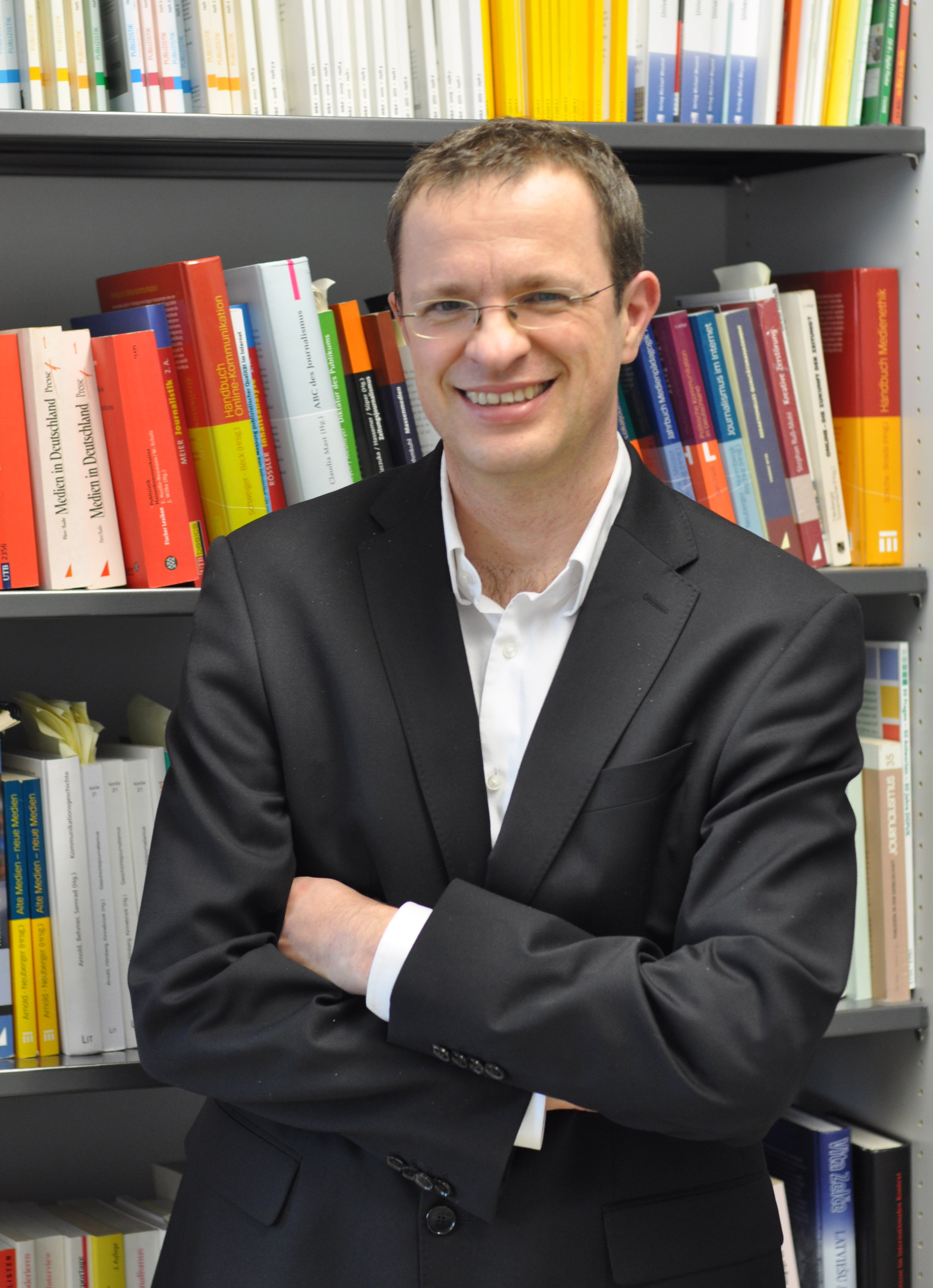 Aufgenommen von Antje Eichler